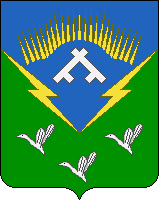 Проект герба поселка Раякоски Мурманской области